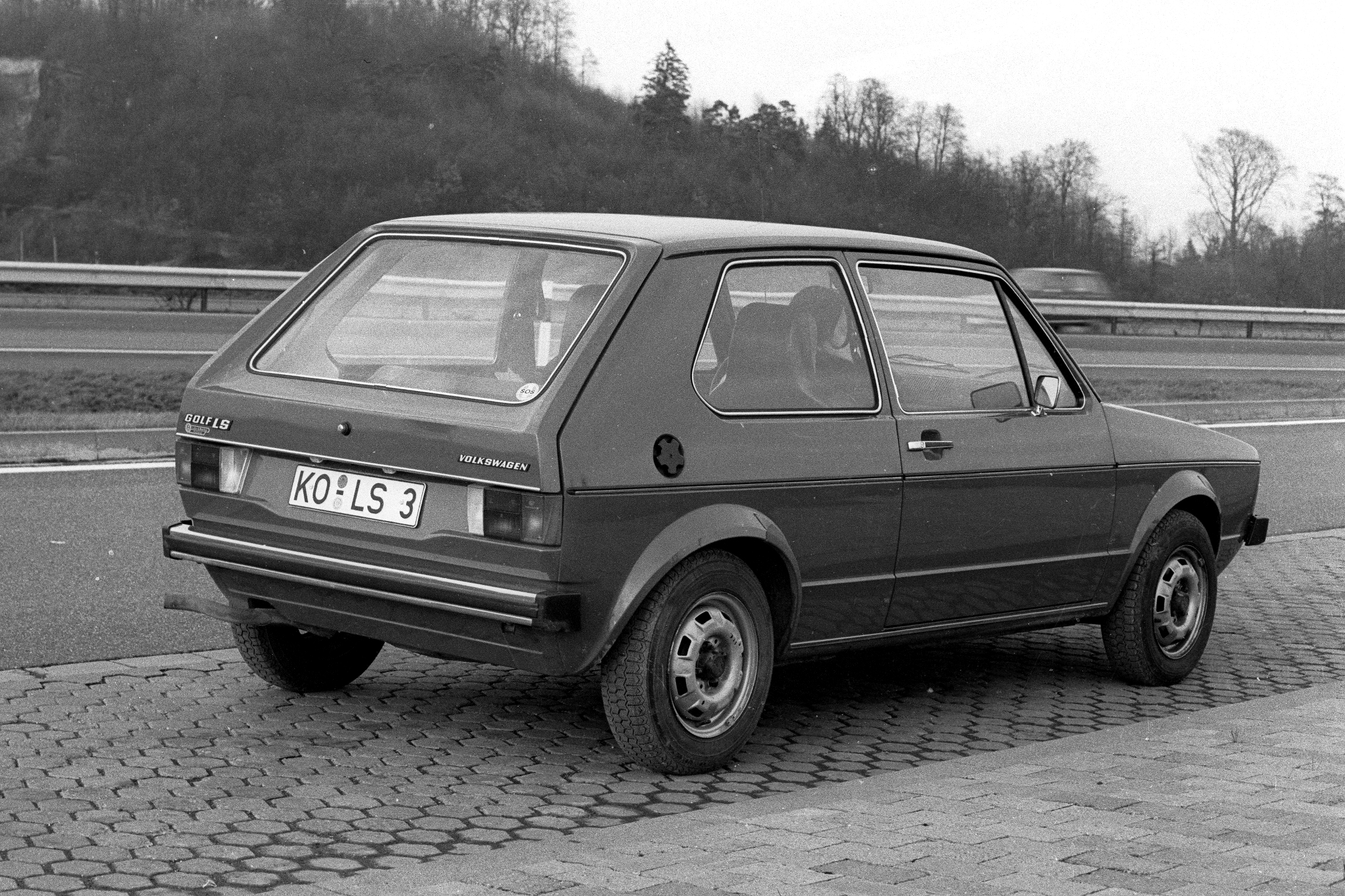 Bildbeschreibung: VW Golf I LS, Baujahr 1974 Fotograf: Lothar Spurzem Datum: Februar 1975